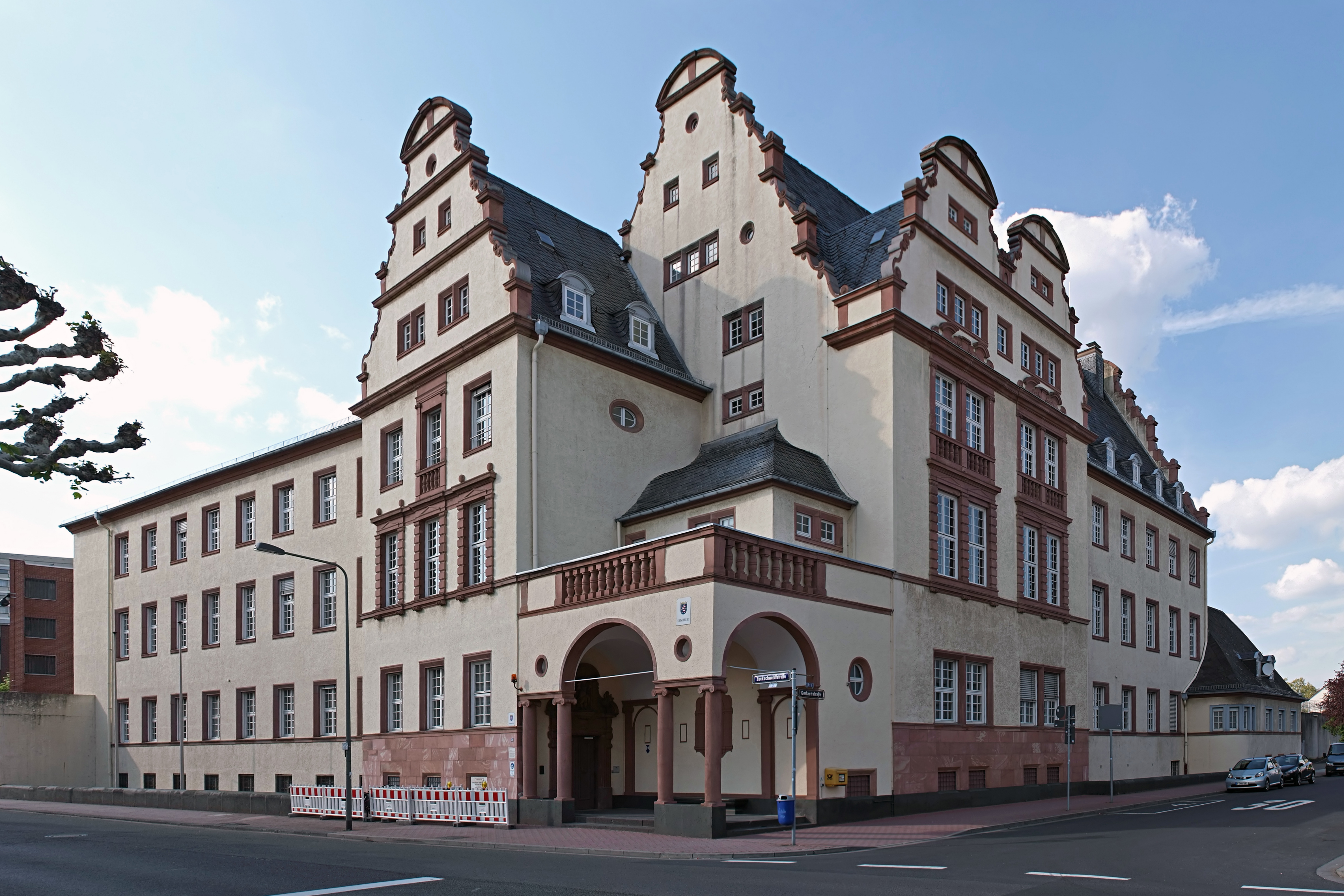 Amtgericht Frankfurt-Höchst